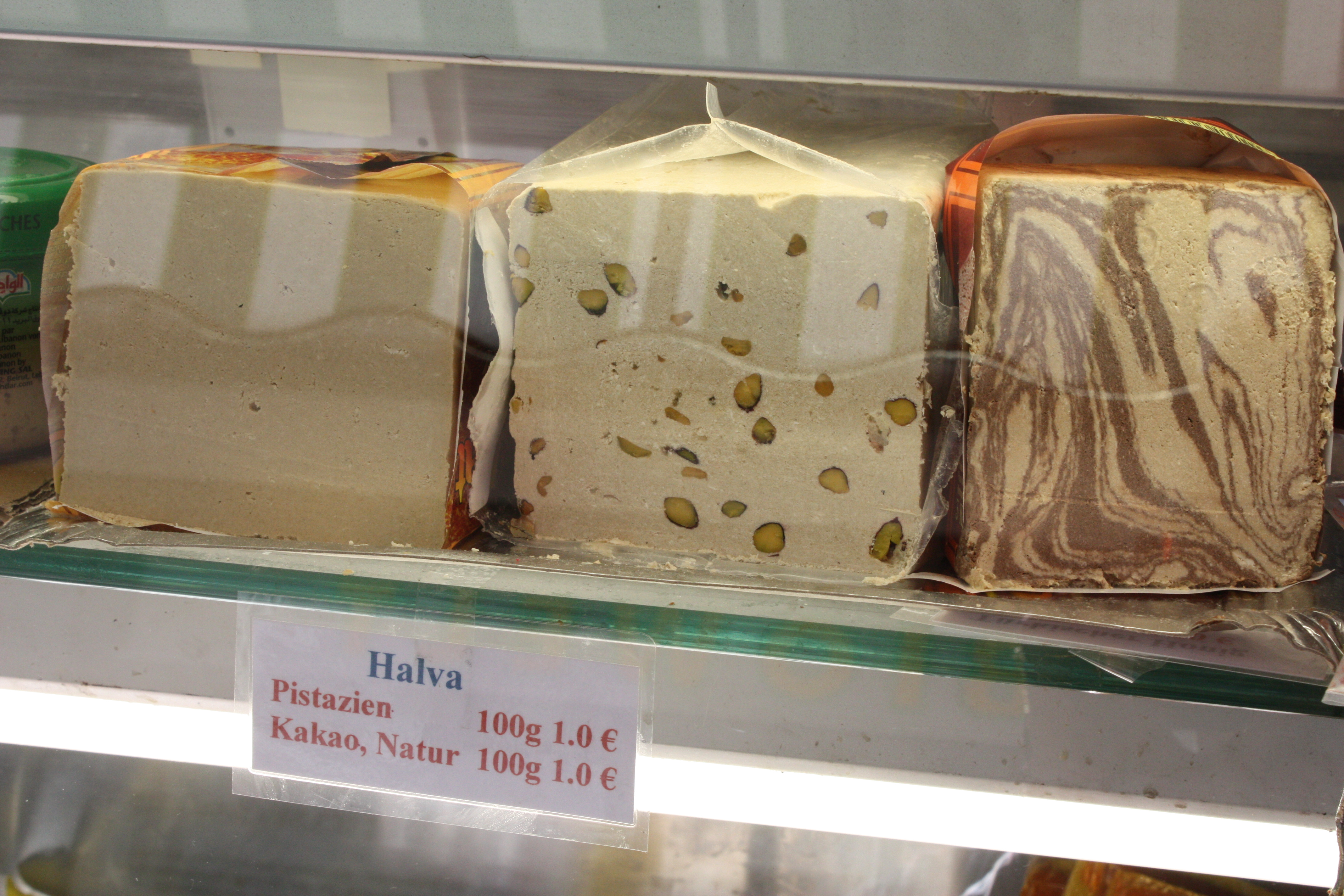 Naschmarkt, Vienna, Wien: Halwa: natur, Pistazien, Kakao